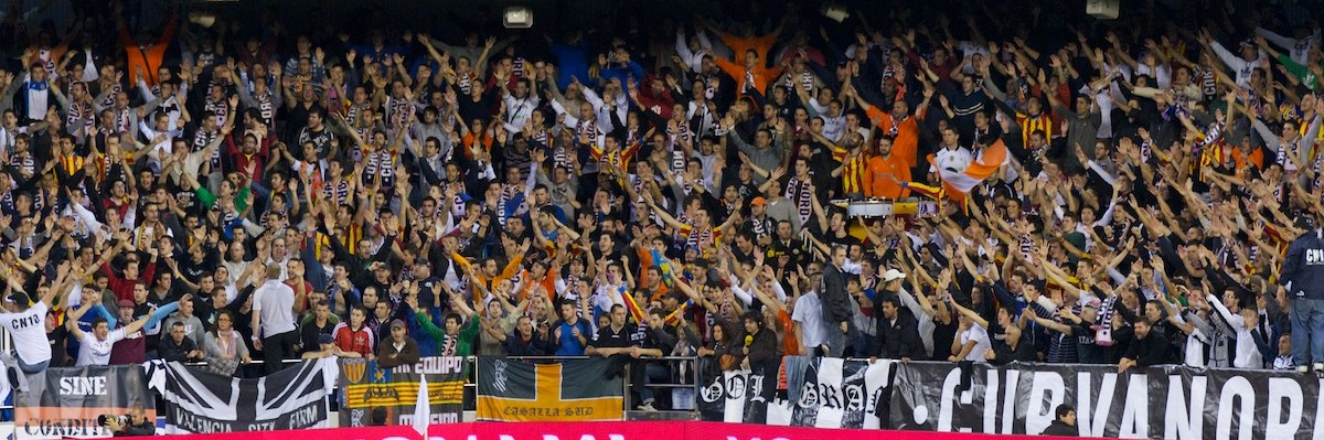 Valencia CF - Español 2012 #32